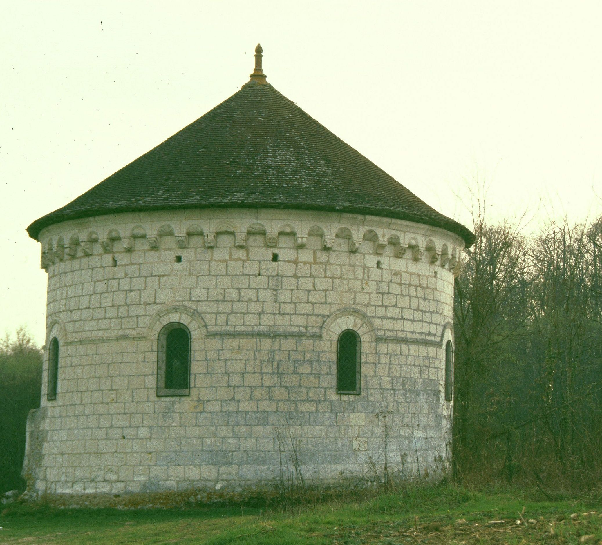 Chapelle St. Jean-Baptiste du Liget